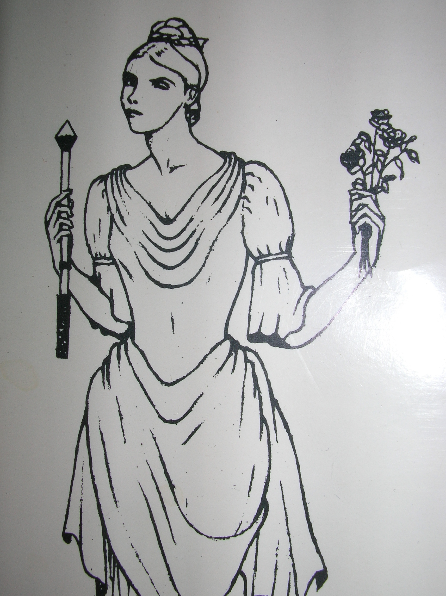 La Cecchina